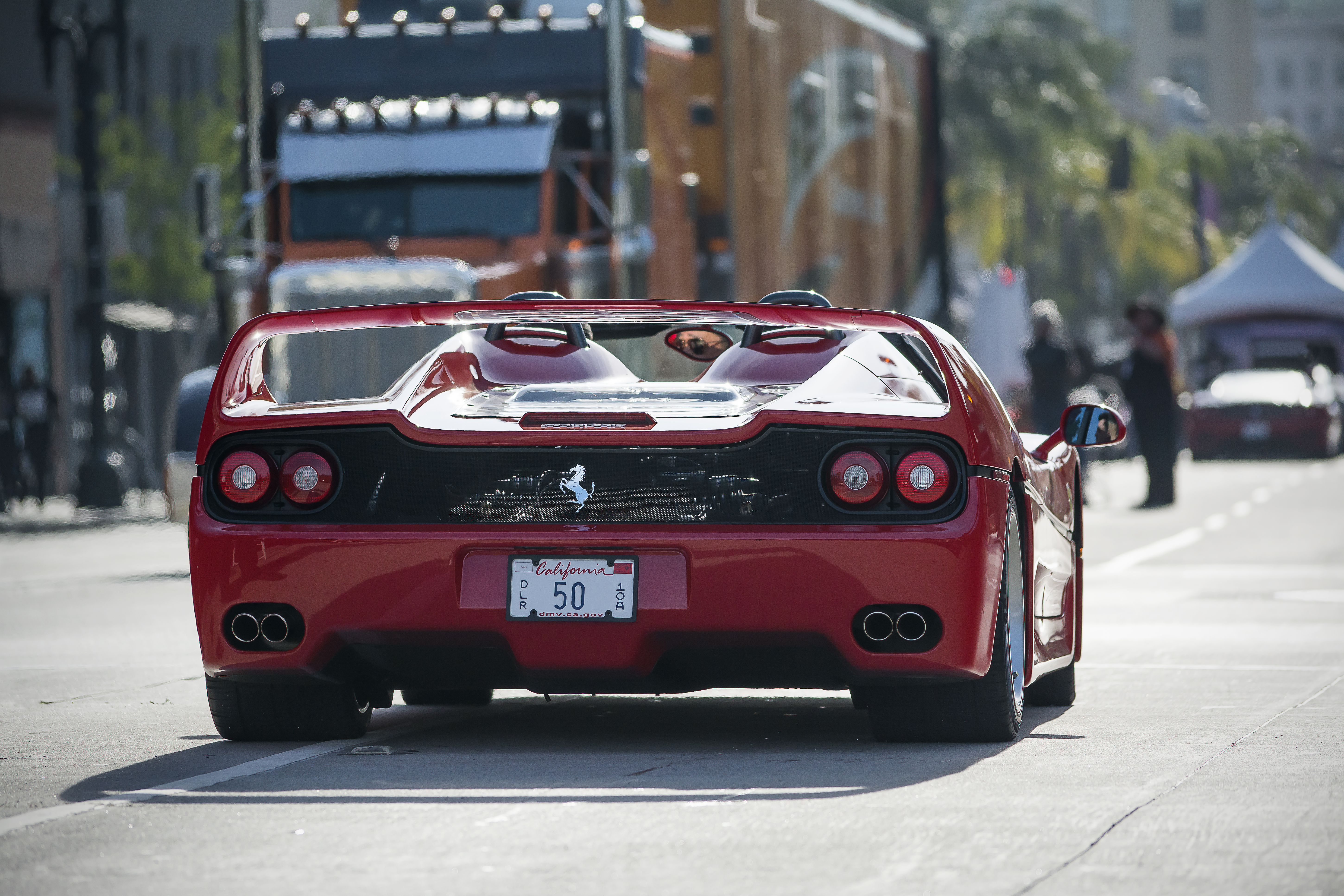 Ferrari F50 arriving at Concorso Ferrari in Pasadena California